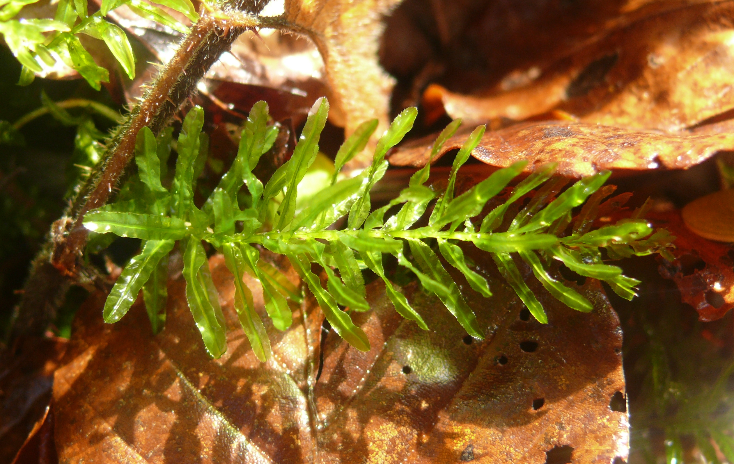 Plagiomnium undulatum, Schwäbisch-Fränkische Waldberge, Germany